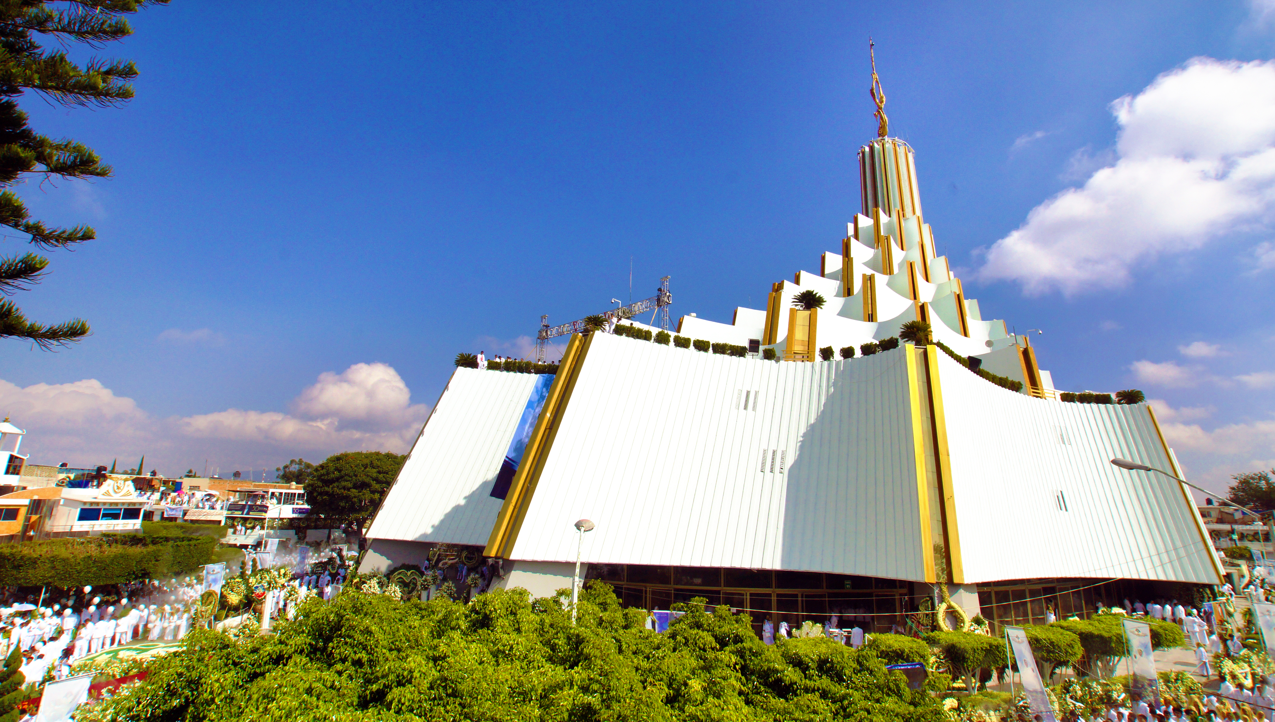 14 diciembre del 2014. Naasón Joaquín García es conocido como presidente de la Luz del Mundo